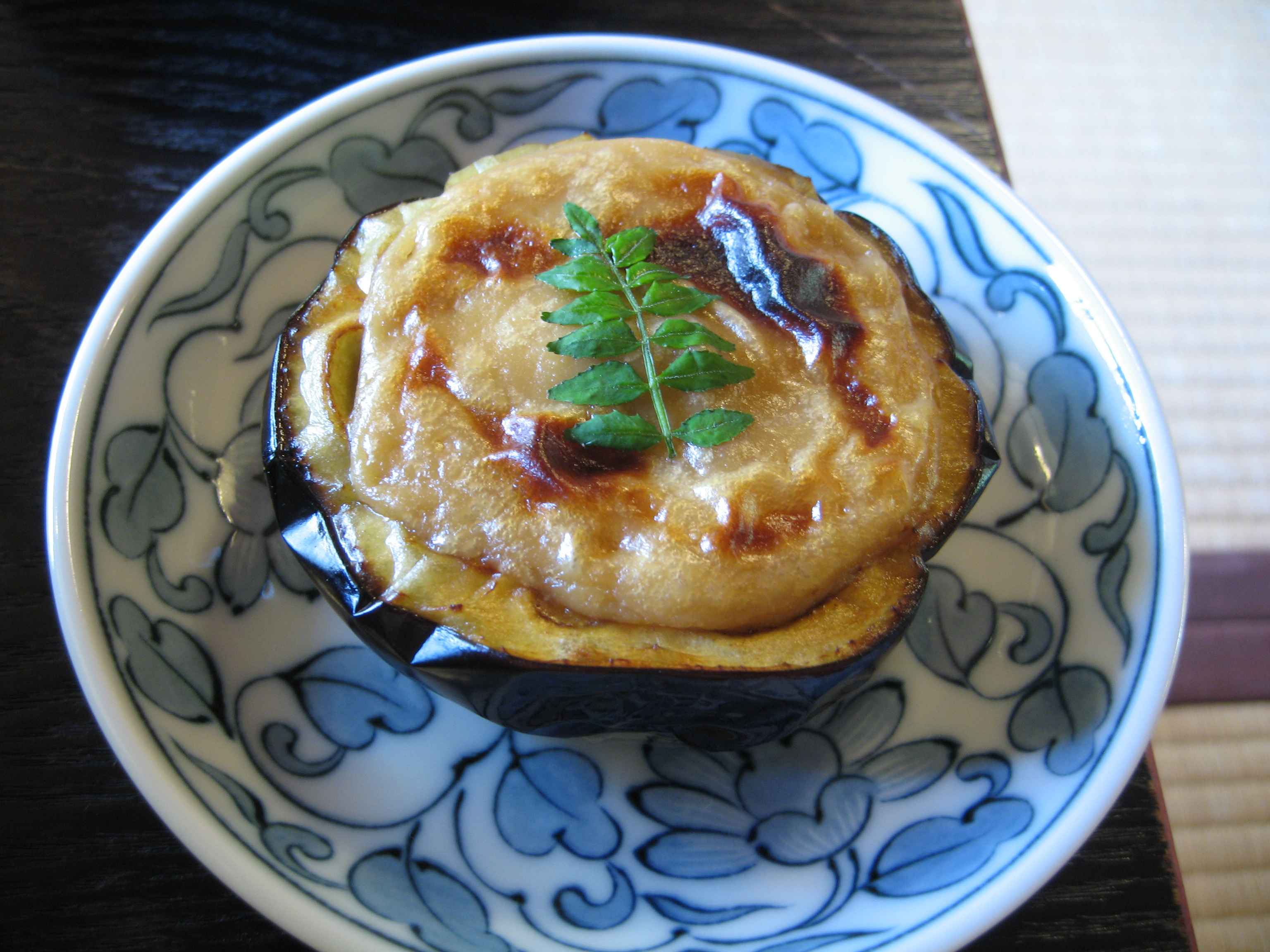 揚げ茄子の味噌田楽